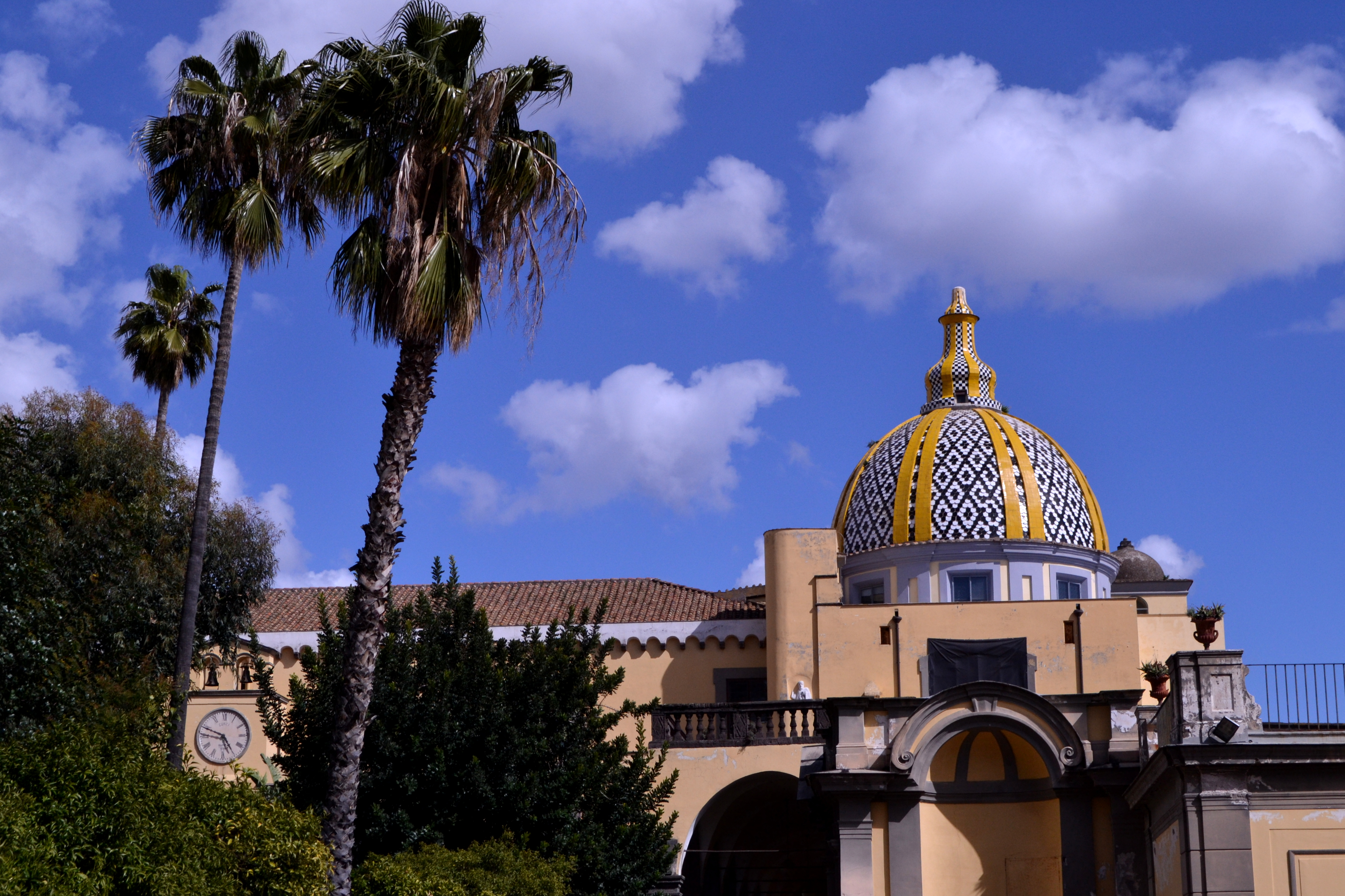 Cupola della chiesa dei Santi Marcellino e Festo di Napoli vista dal chiostro monumentale.